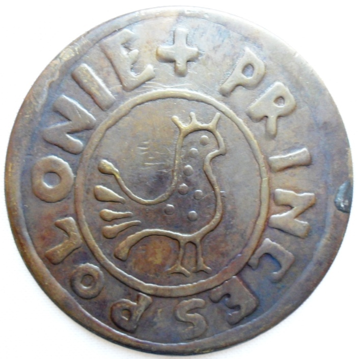 Medal pamiątkowy LO Gubin